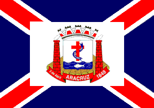 bandeira do município de Aracruz, Espírito Santo, Brasil